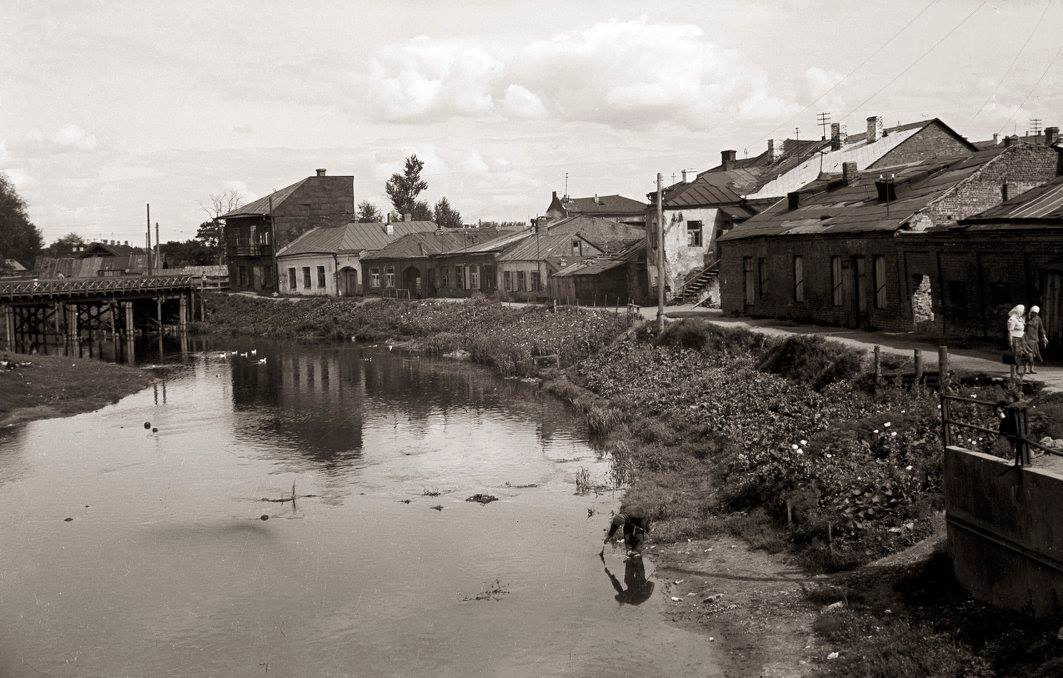 Забудова Зыбіцкай ля Свіслачы